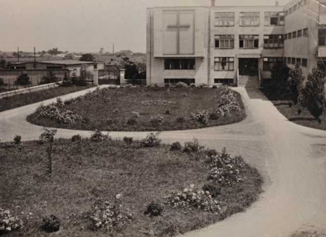 Dům sloužil jako bydlení pro řádové sestry, v areálu nemocnice.